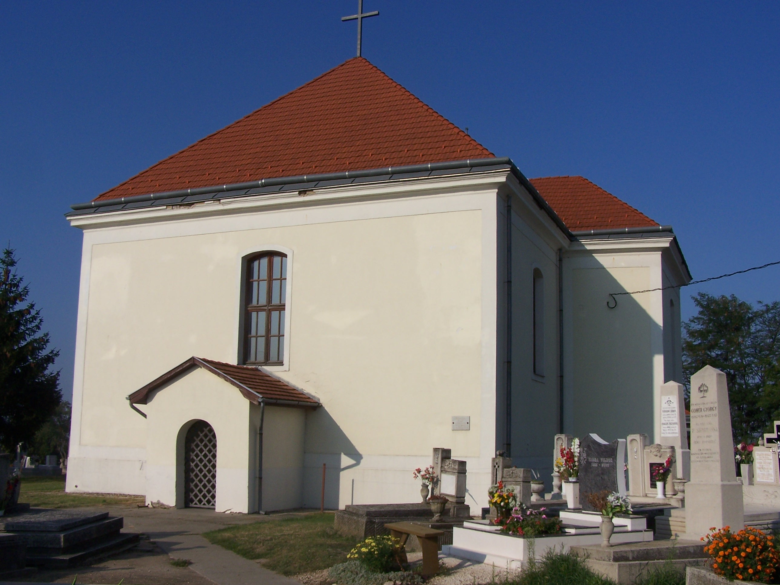 Evangélikus templom (Maglód, Sugár út 66., temető)